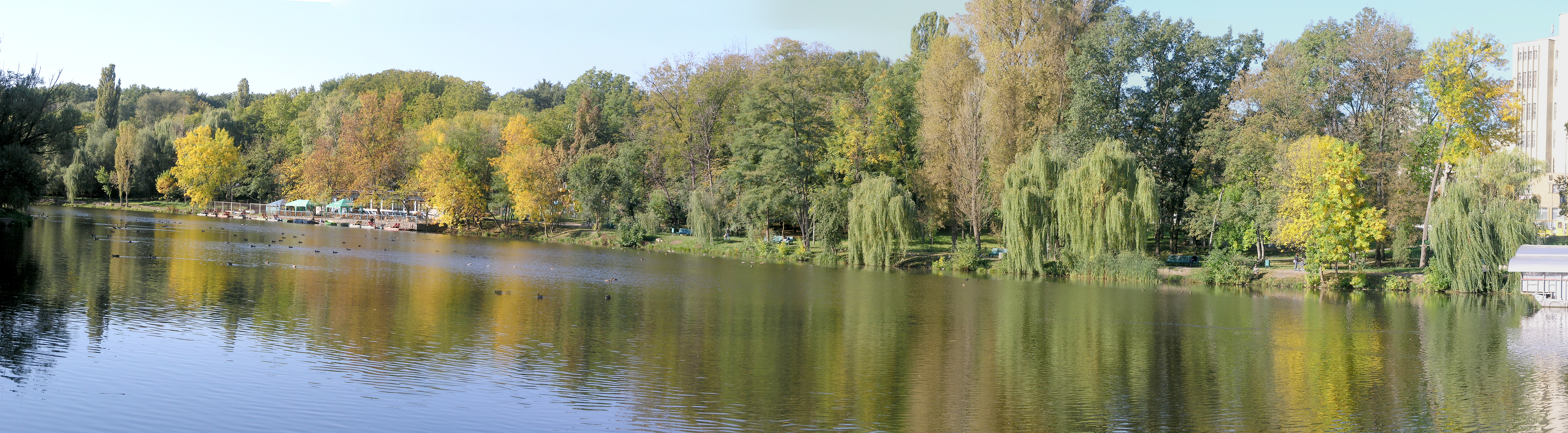 Україна, Київ - Голосіївський парк ім. Рильського М. Т.